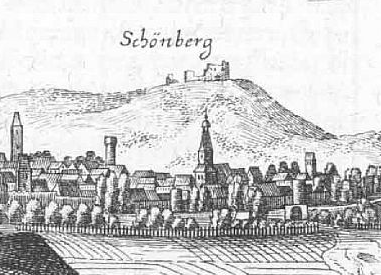 Burgruine Schön(e)berg über Hofgeismar, Hessen, aus: Topographia Hassiae, Teilausschnitt